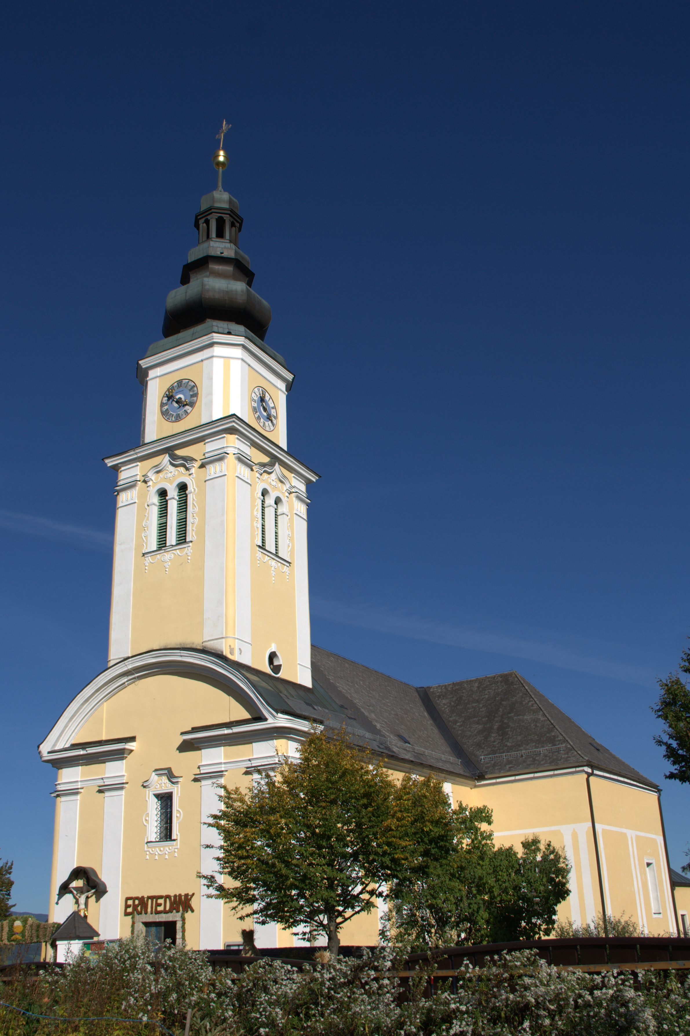 Kath. Pfarrkirche hl. Margaretha und Kirchhofmauer mit Nischenkapellen